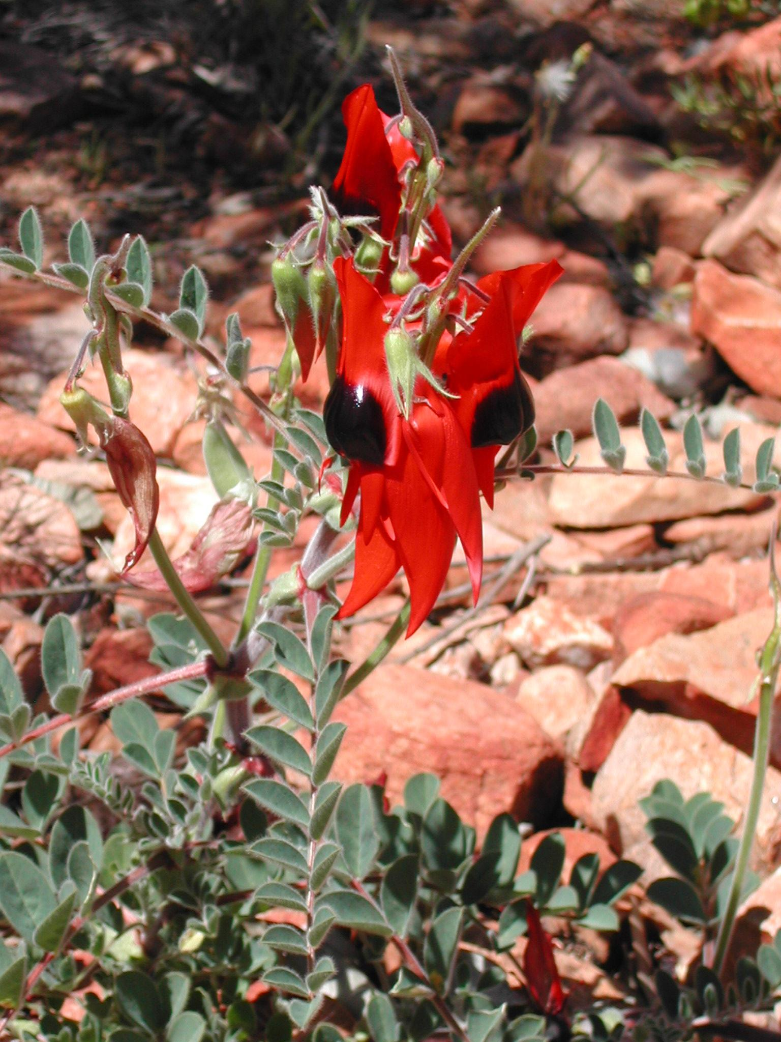 Clianthus_formosus